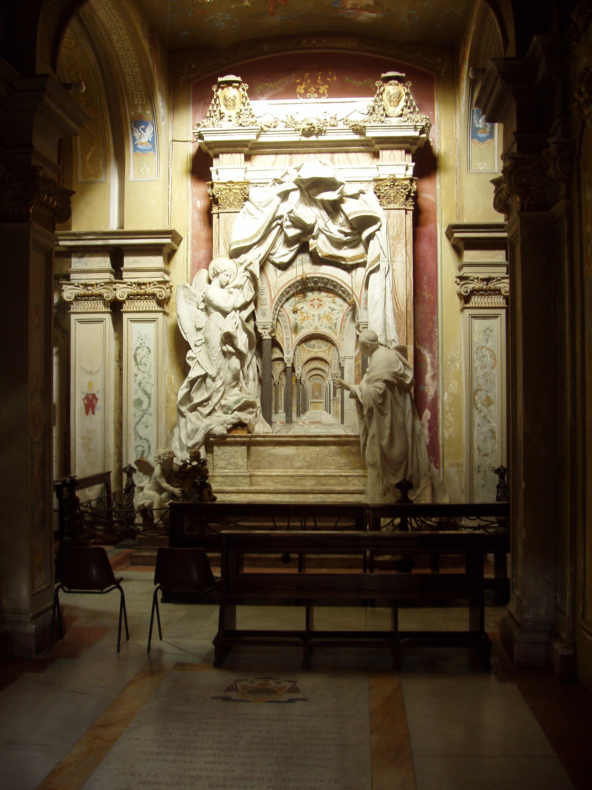 Monumento funebre del Cardinale Mariano Rampolla del Tindaro nella basilica di Santa Cecilia a Trastevere